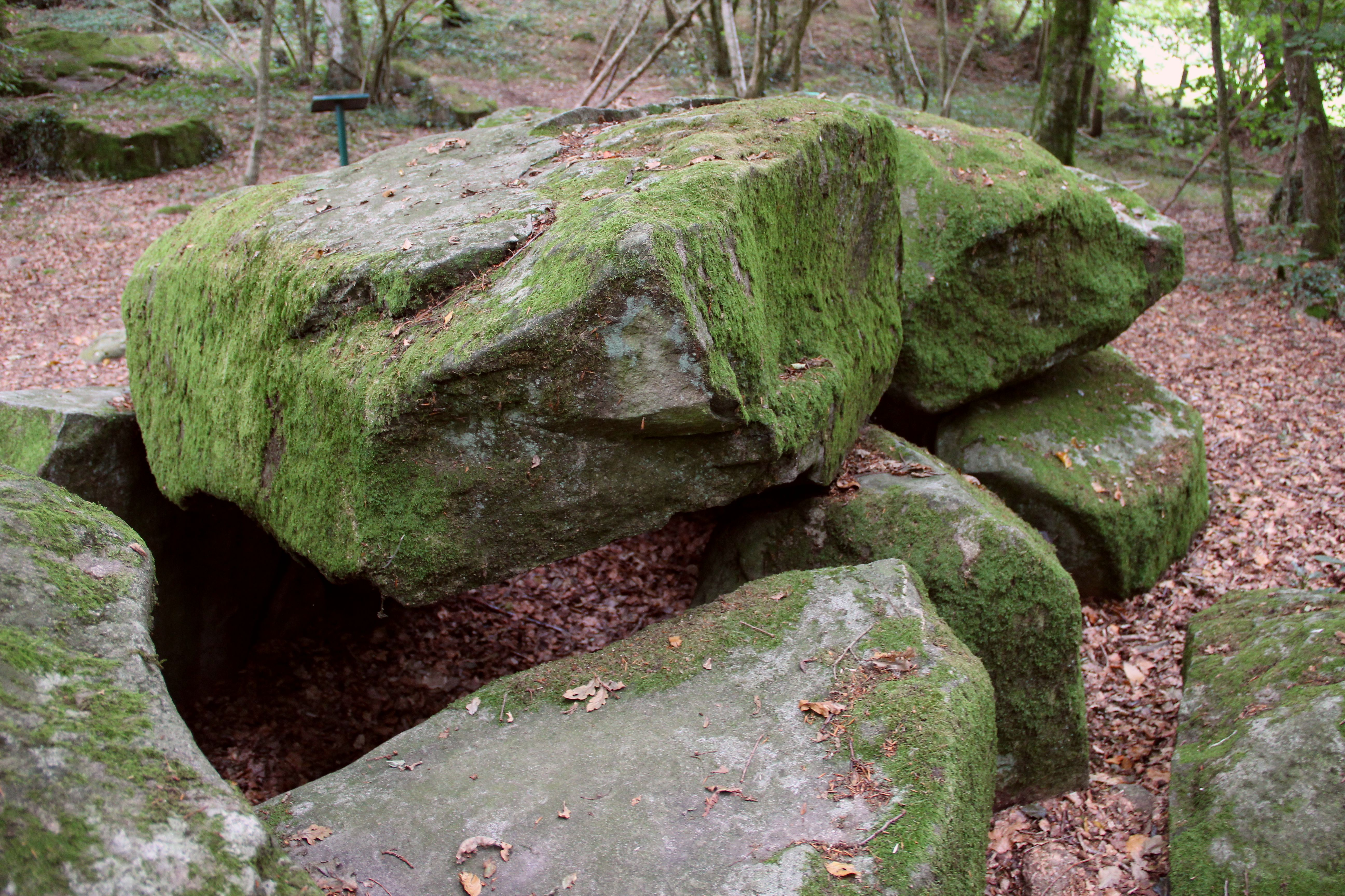 Le dolmen de la Contrie à Ernée.